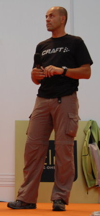 Radek Jaroš na Brněnském výstavišti.